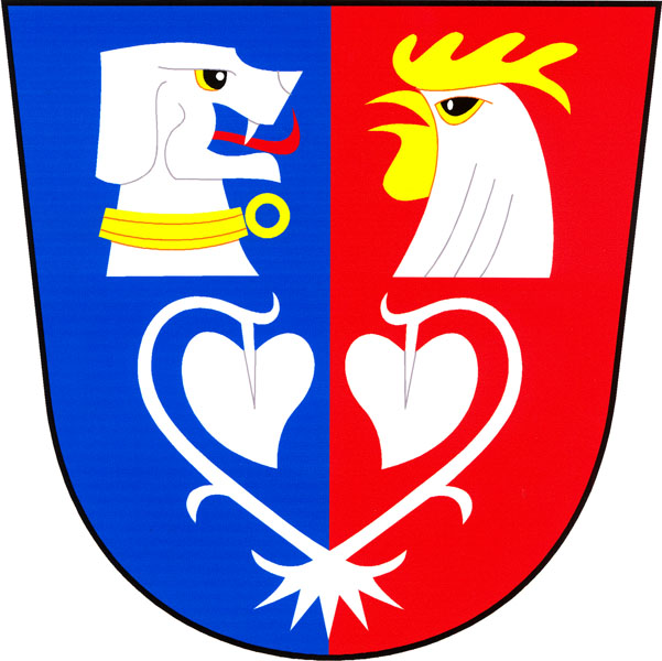 Znak obce Radošovice